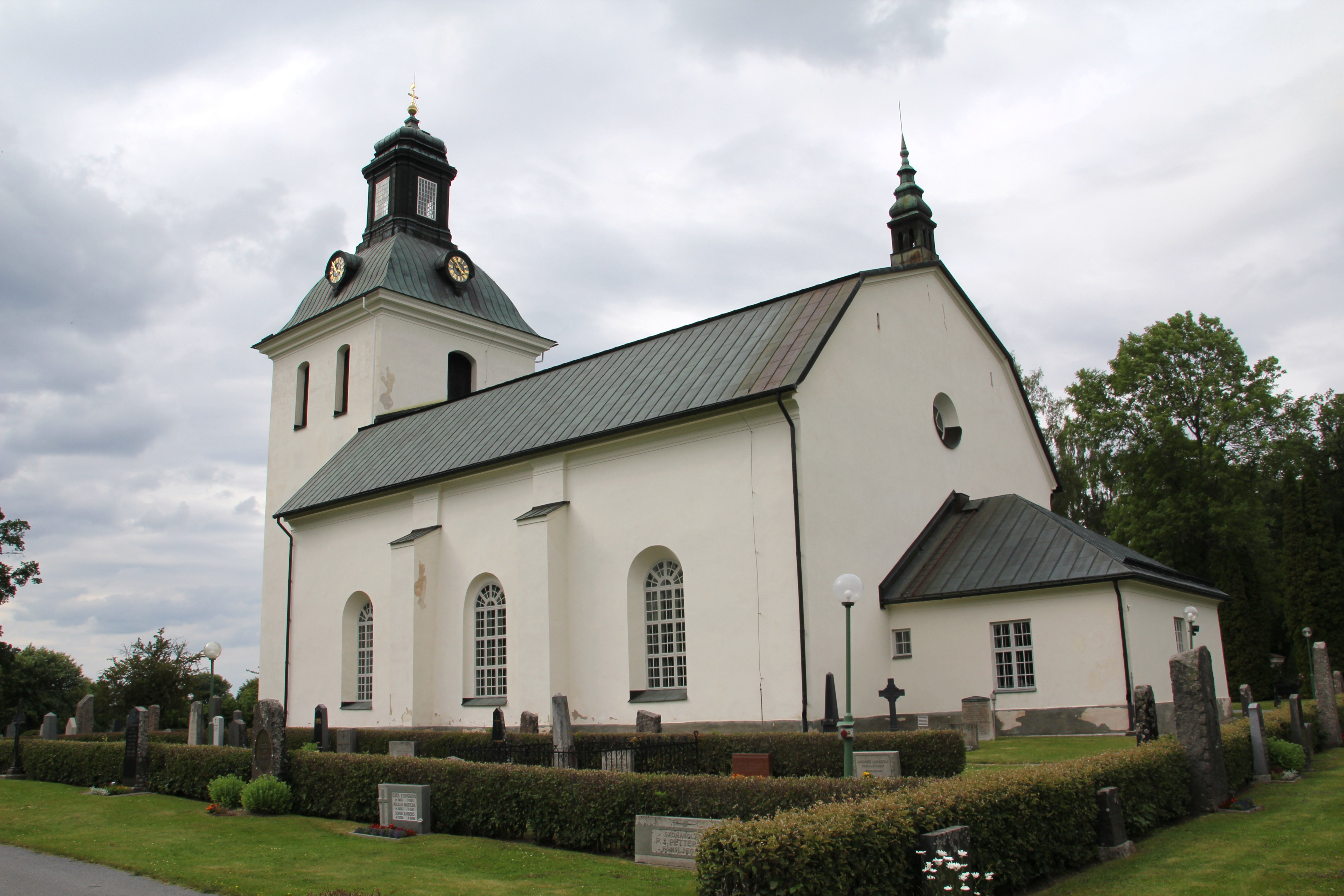 Nora kyrka i Heby kommun.